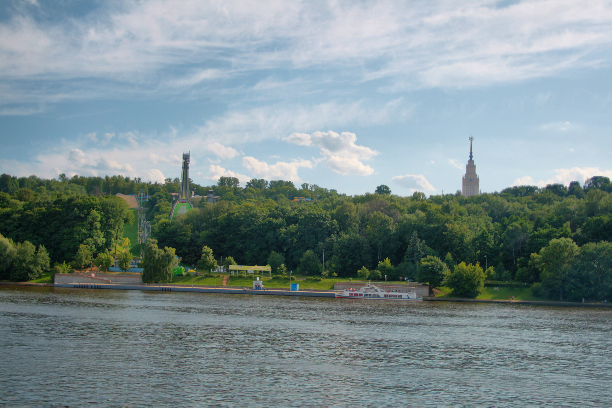 Воробьёвы горы